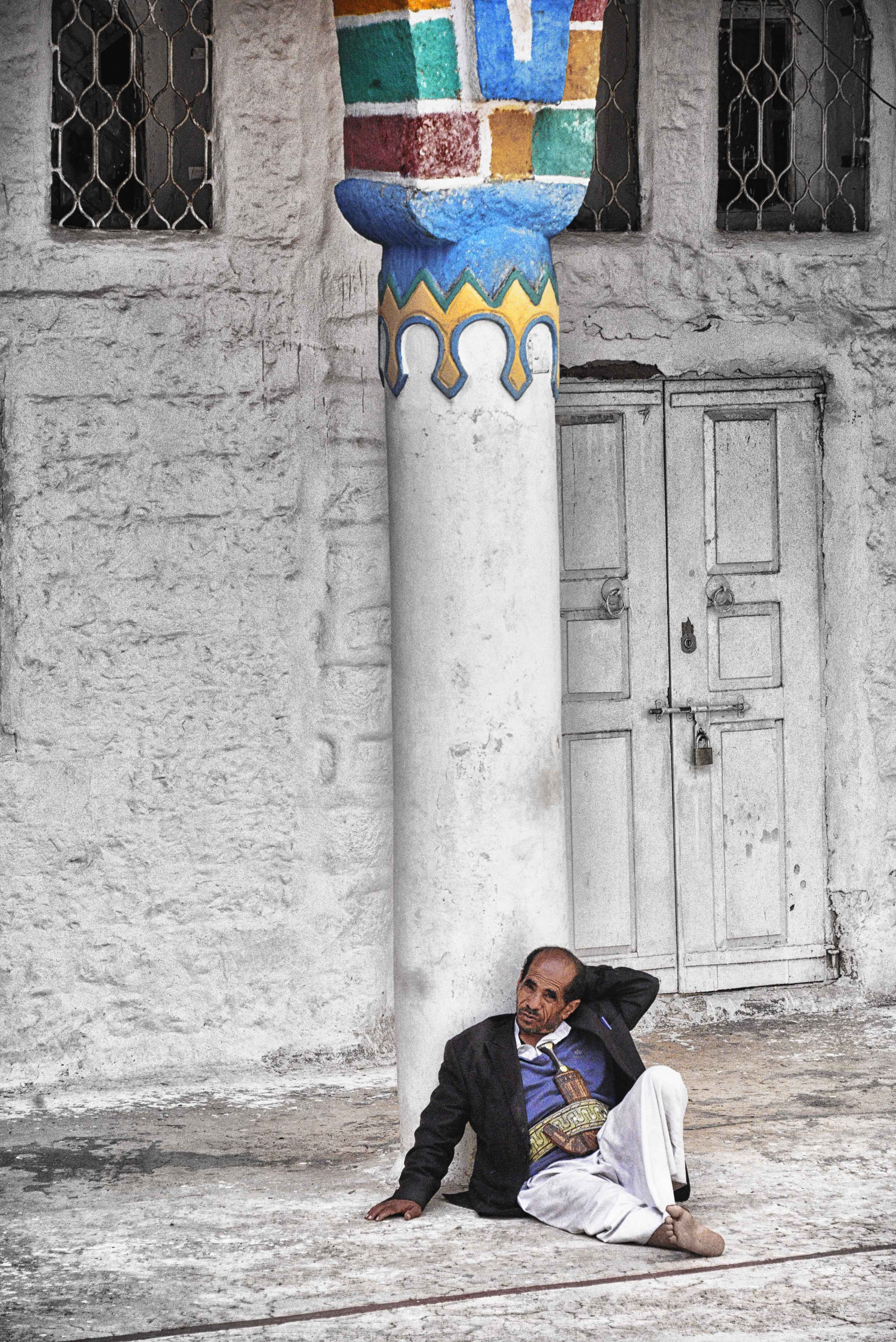 Mosque, Yemen